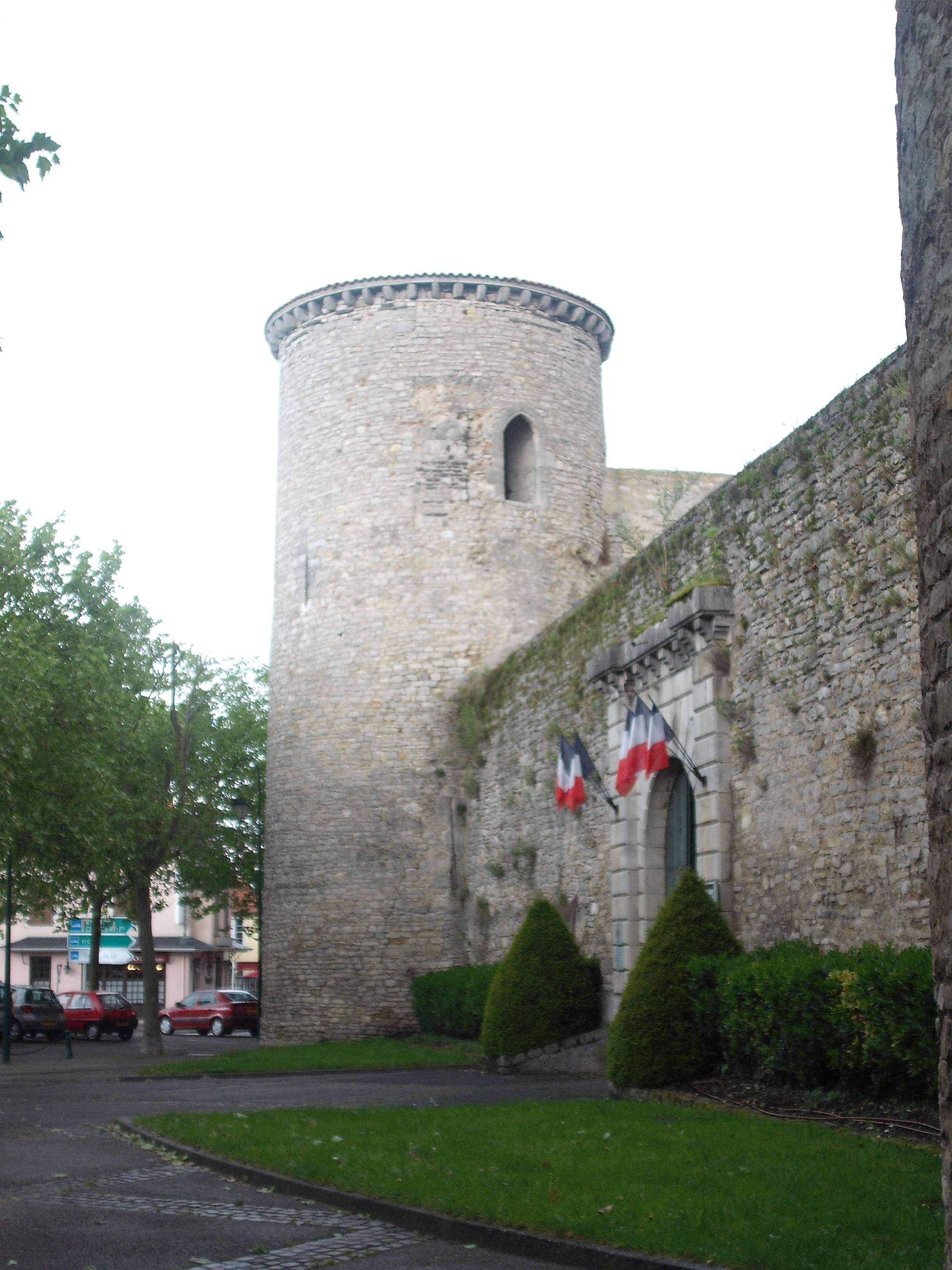 Entrée du Château-Musée de Gannat.